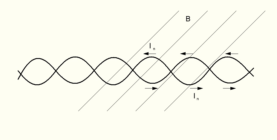 Periaatekuva kierretyn parin toiminnasta.